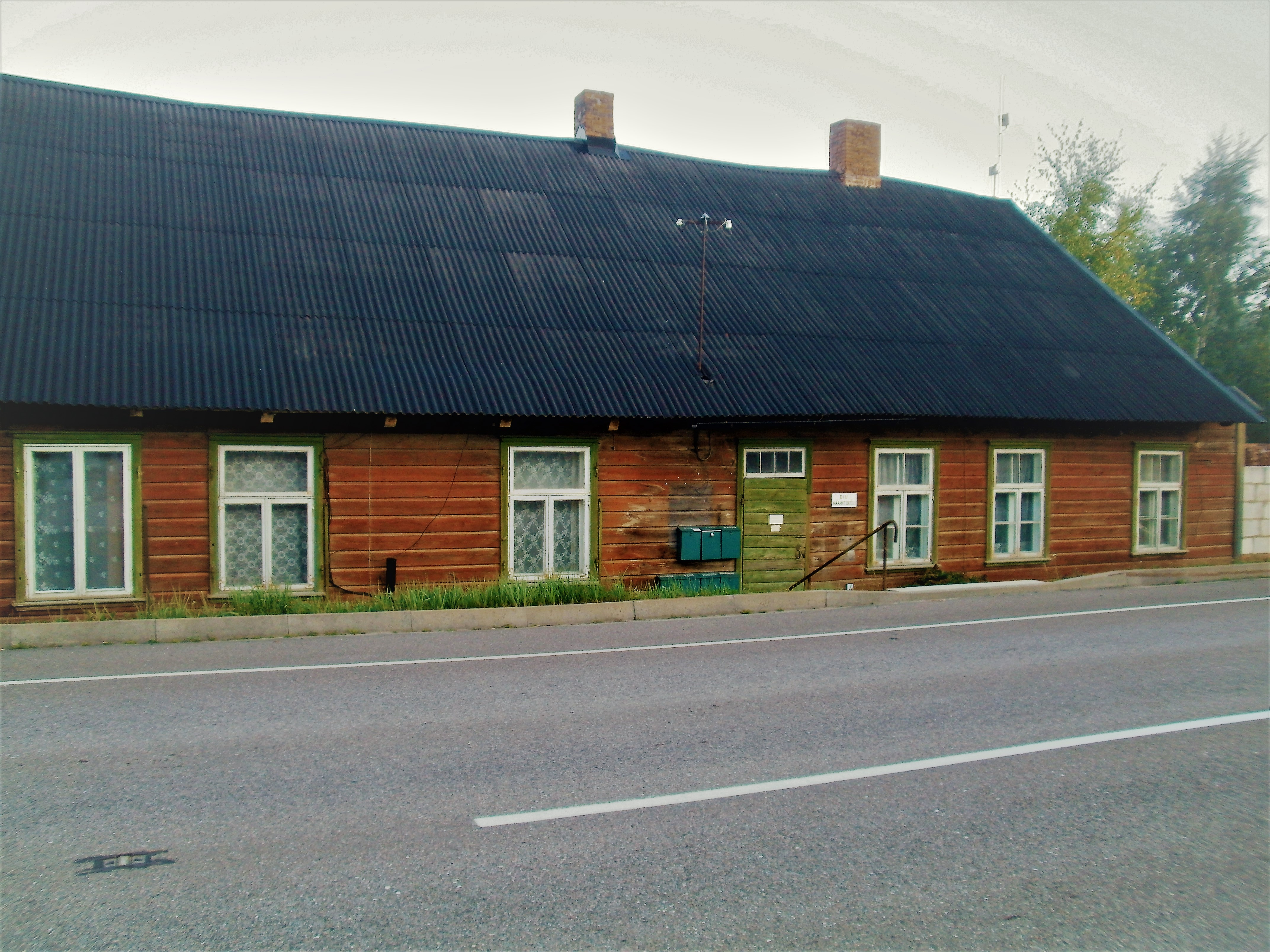 Vana kõrts ja postkontor jõesilla lähedal. Vaade põhjasuunas.